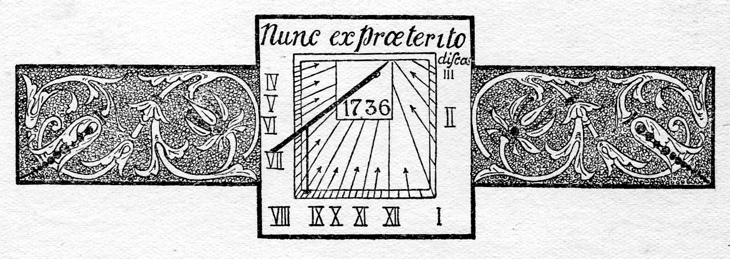 School sundial 1736